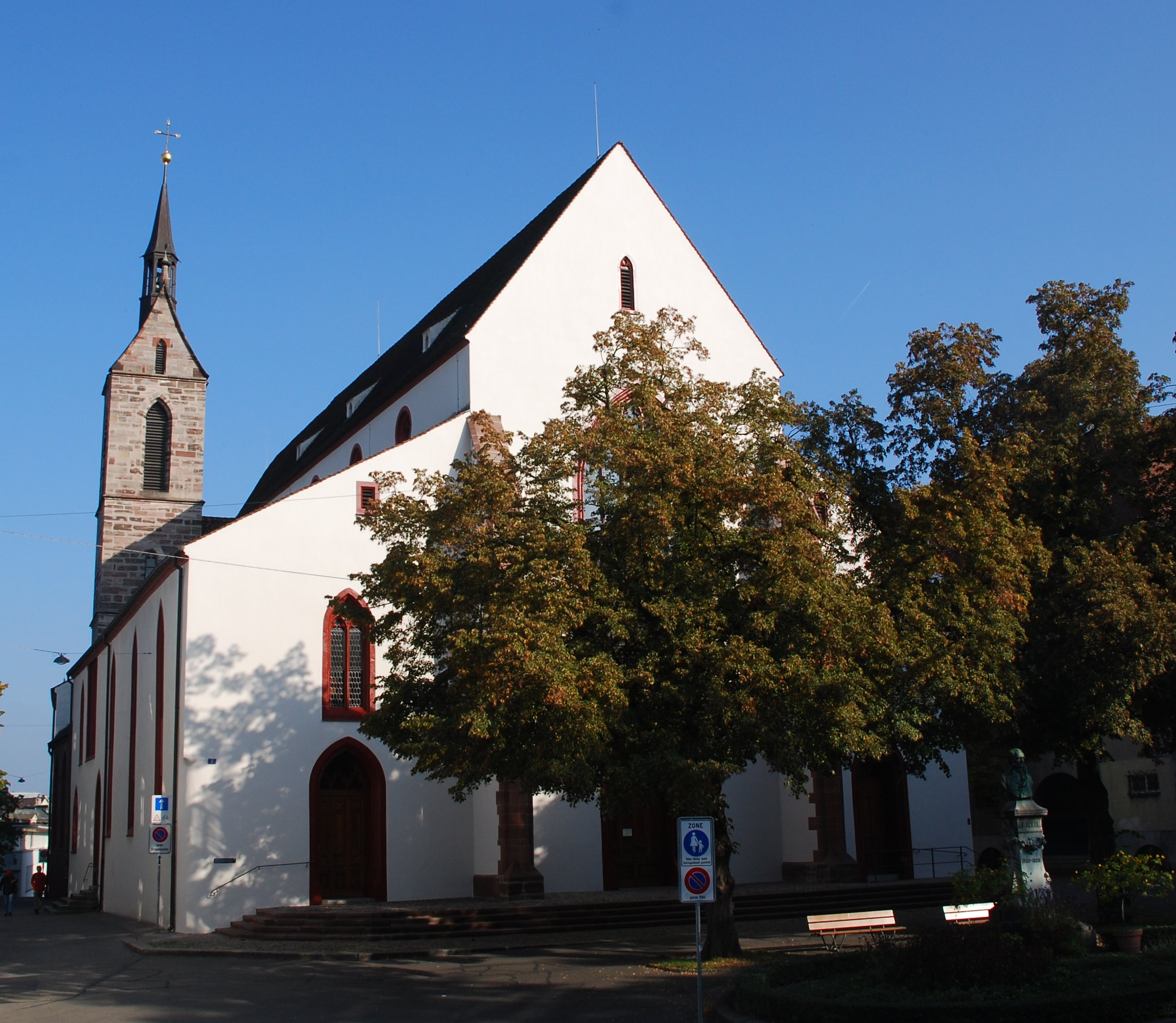 Peterskirche in Basel